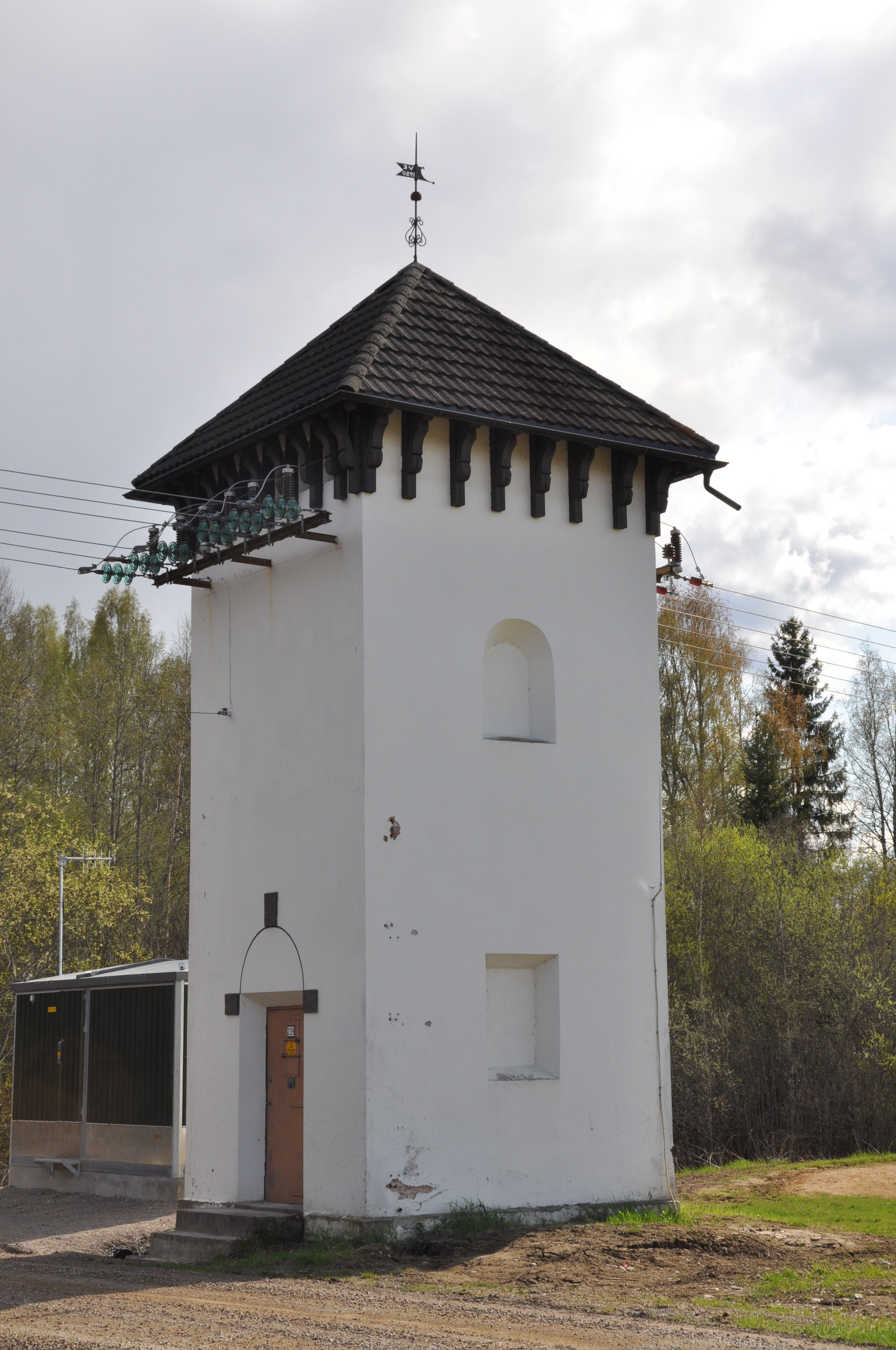 Skansgården transformatorkiosk ved Kongsvinger i Hedmark. Den ble satt i drift i 1920. Dato: 05.05.2009.